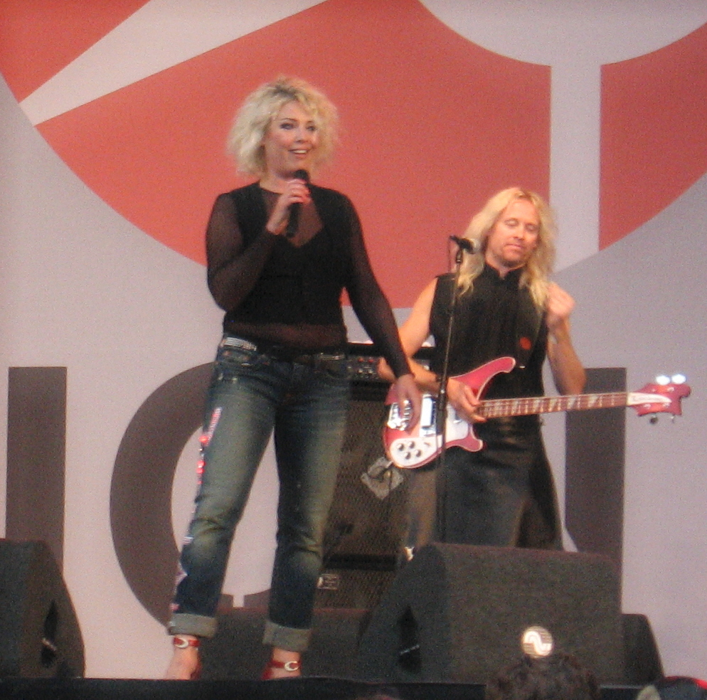 Kim Wilde, Nick Beggs (Art Nouveau, Ellis, Beggs, & Howard, Iona, Kajagoogoo, Rockets) Parkpop 2007, Den Haag